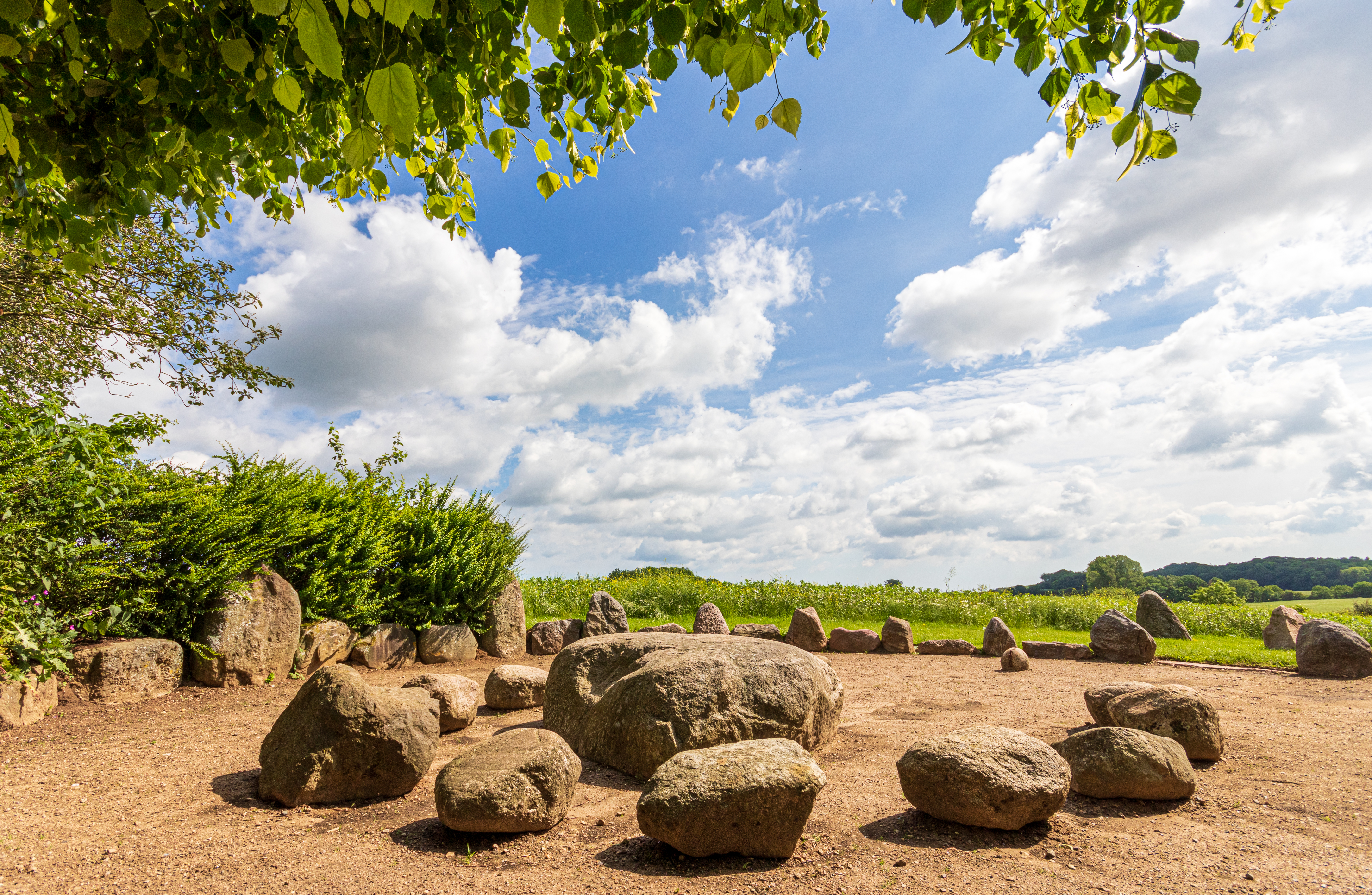 Stoltebüll, Schleswig-Holstein, neuzeitliche Rekonstruktion eines alten Gerichtsplatzes, eines Thingplatzes